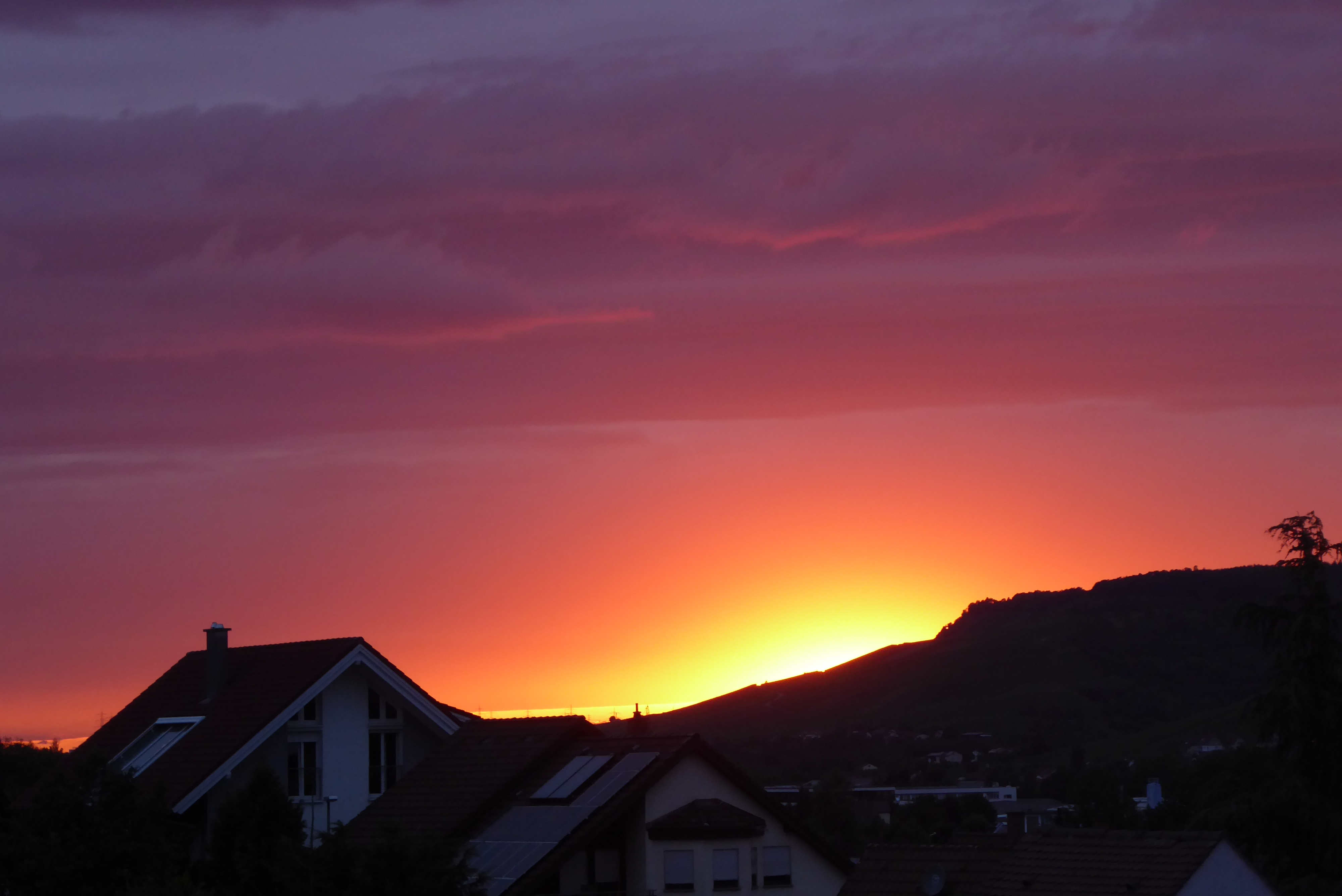 Sonnenuntergang hinter dem Kleinheppacher Kopf, aus Richtung Remshalden